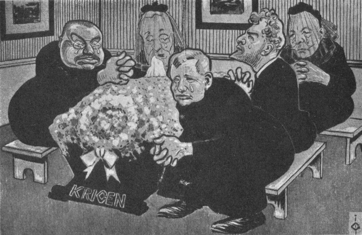 «Det er disse Grædekoner som for Tiden er Norges Ydmygelse». Fra venstre: Gunnar Heiberg, Wollert Konow (H), Jakob Schøning, Bernt Lie, Georg Stang. Karikatur av Gustav Lærum i Morgenbladet, 1905.